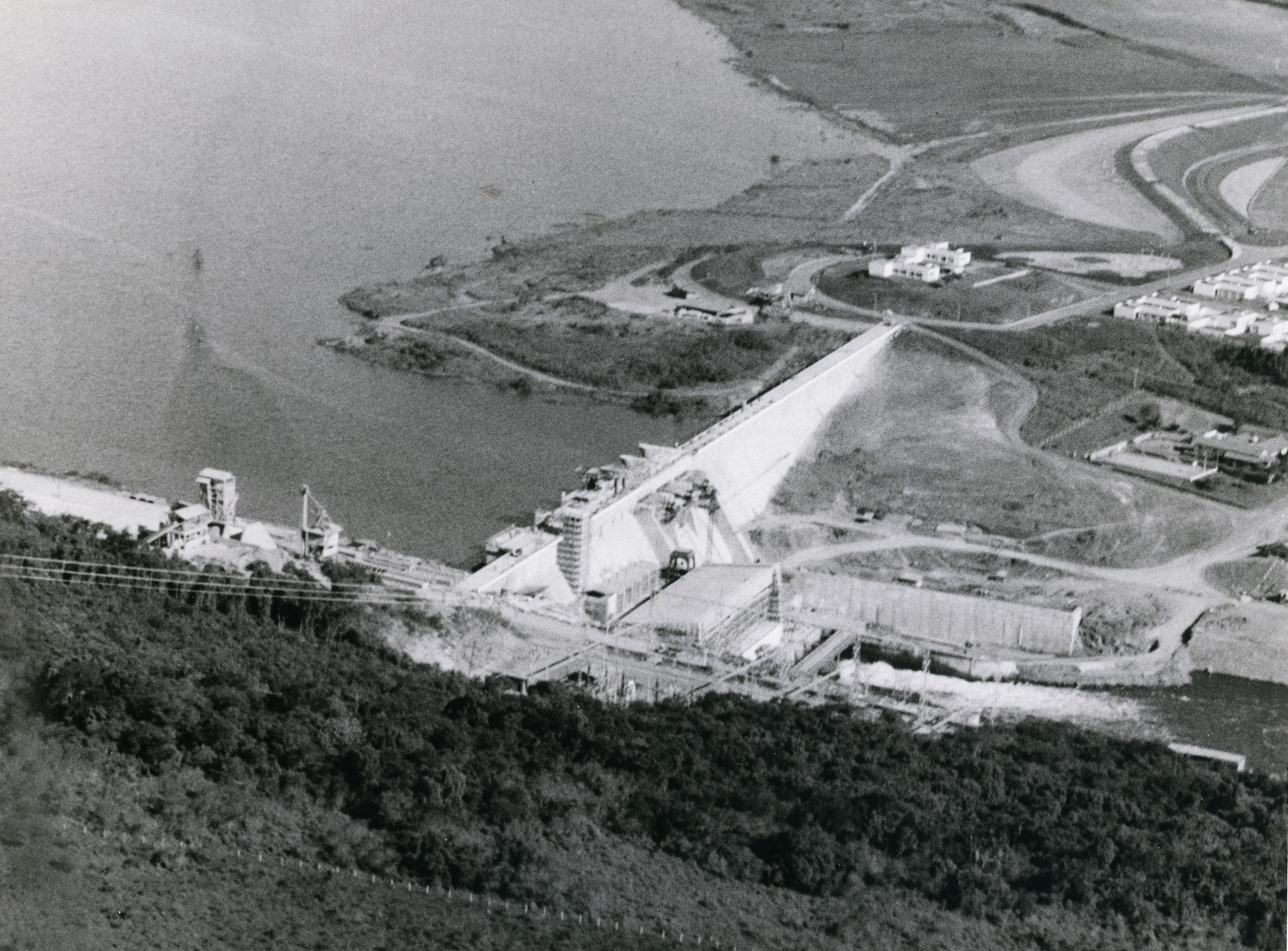 Fotografia do Fundo Correio da Manhã, sob a guarda do Arquivo Nacional.